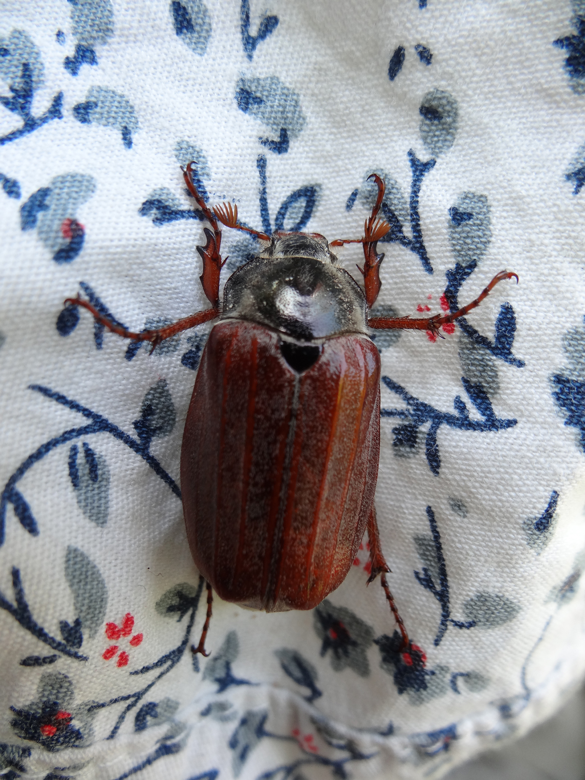 Maikäferweibchen sitzt auf Sommerhut